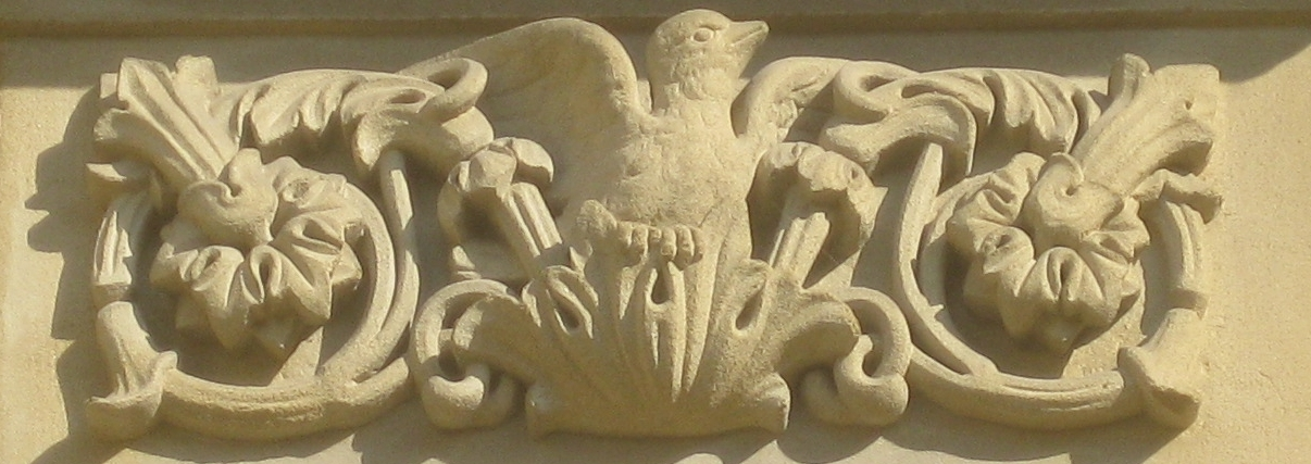 Stuttgart, Villa Berg, Südfassade, linkes Seitenportal, Kämpferrelief 1 (Zählung von links nach rechts).